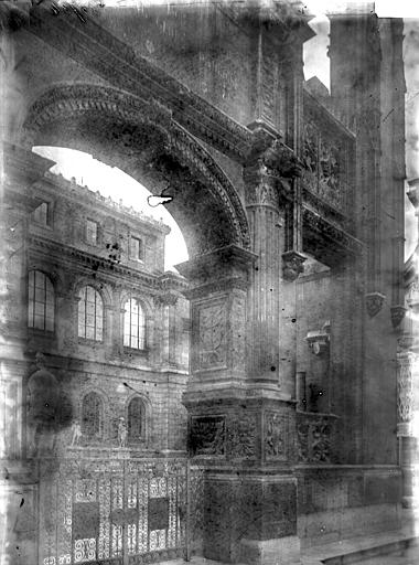 Arc de Gaillon